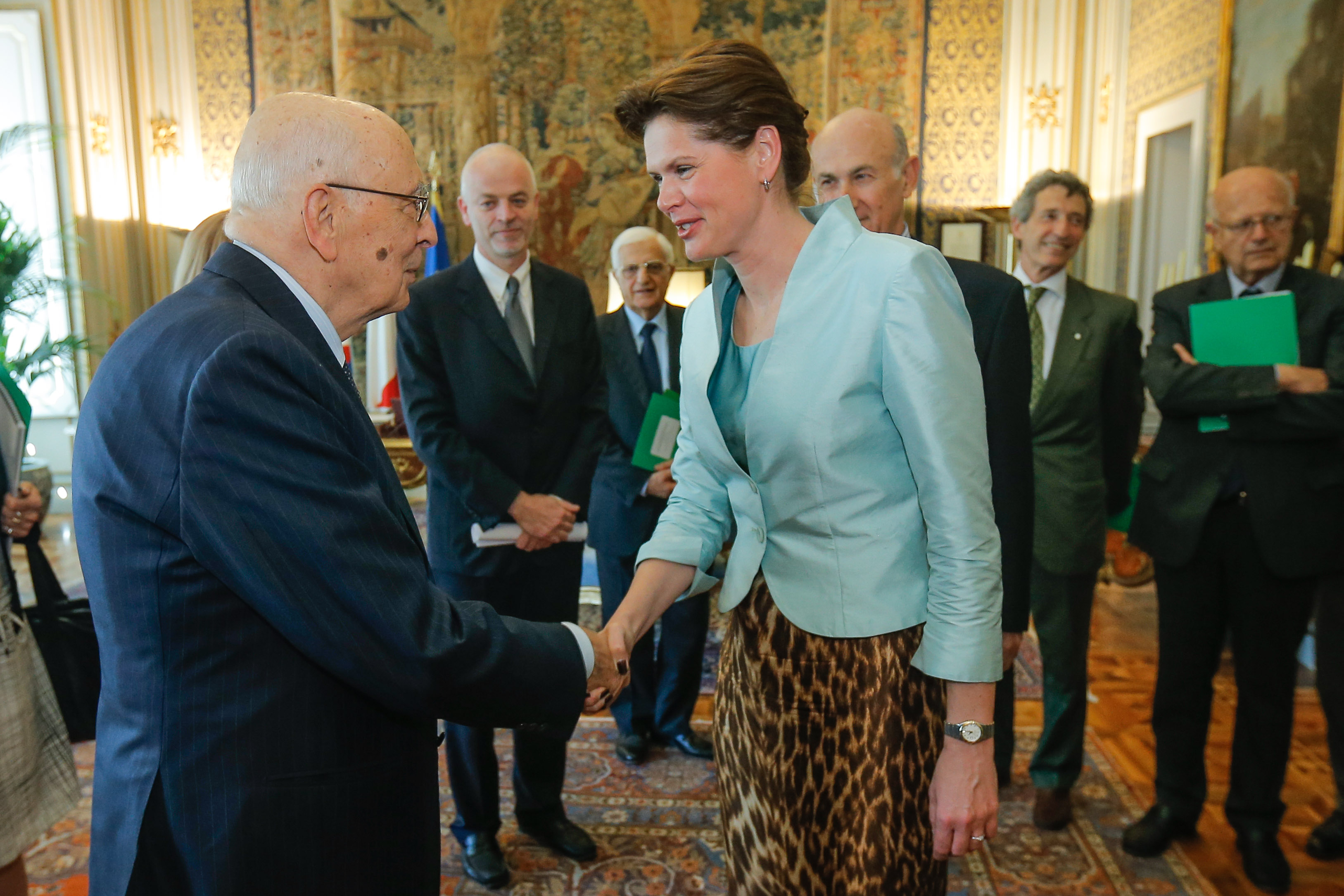 Srečanje premierke Alenke Bratušek z italijanskim predsednikom Giorgiem Napolitanom